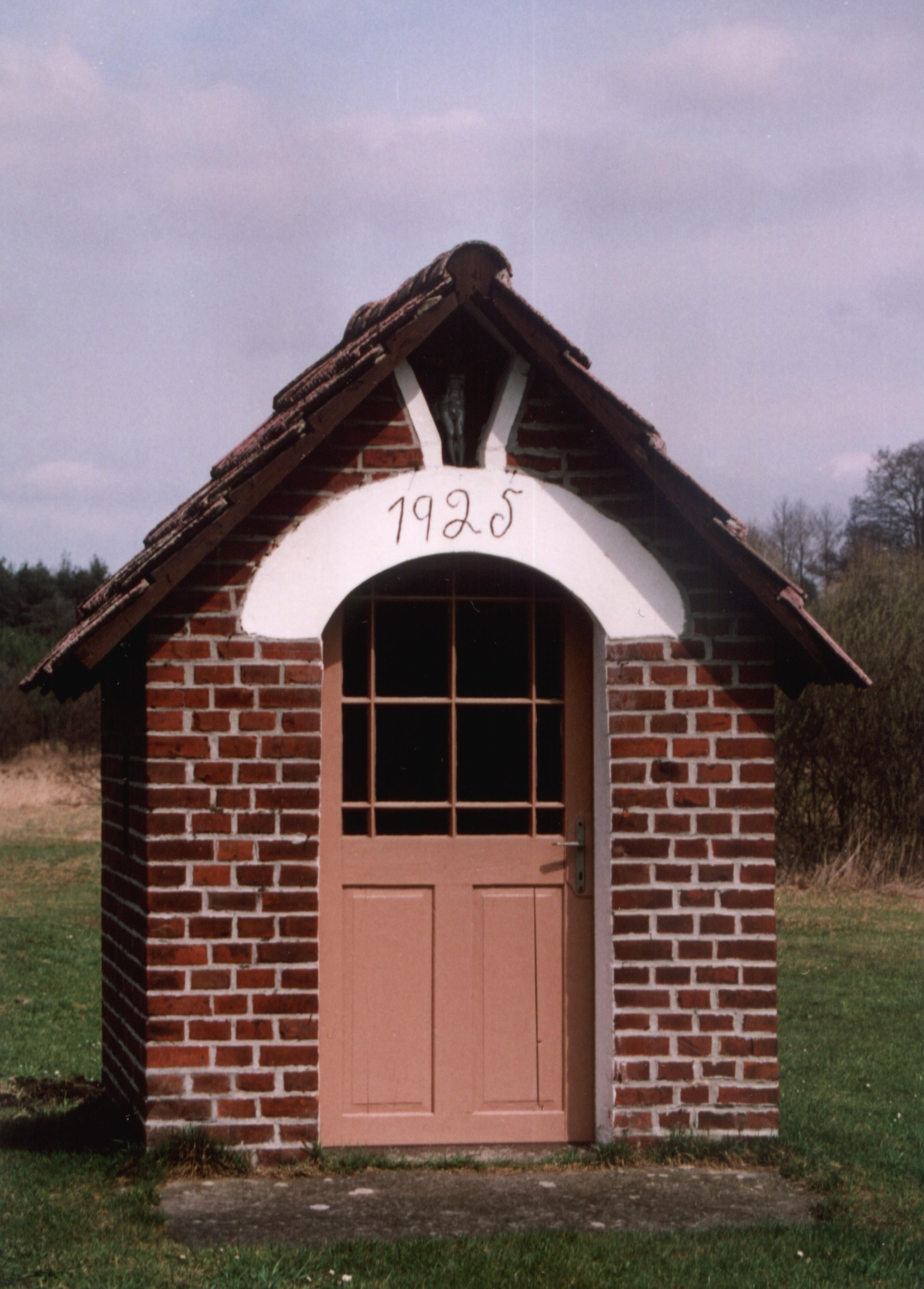 Kapliczka w Hucisku